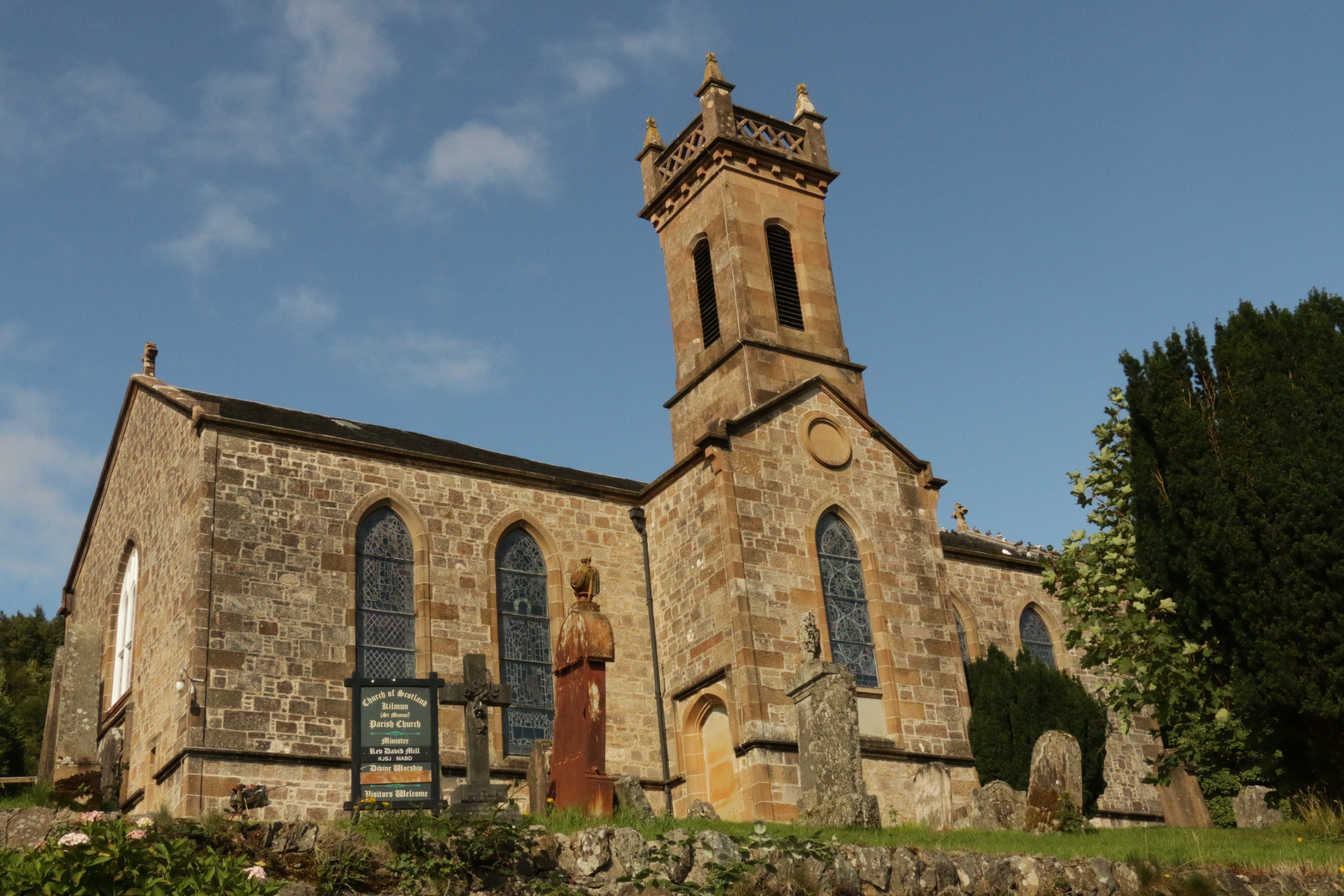 Kirche in Kilmun (Schottland).